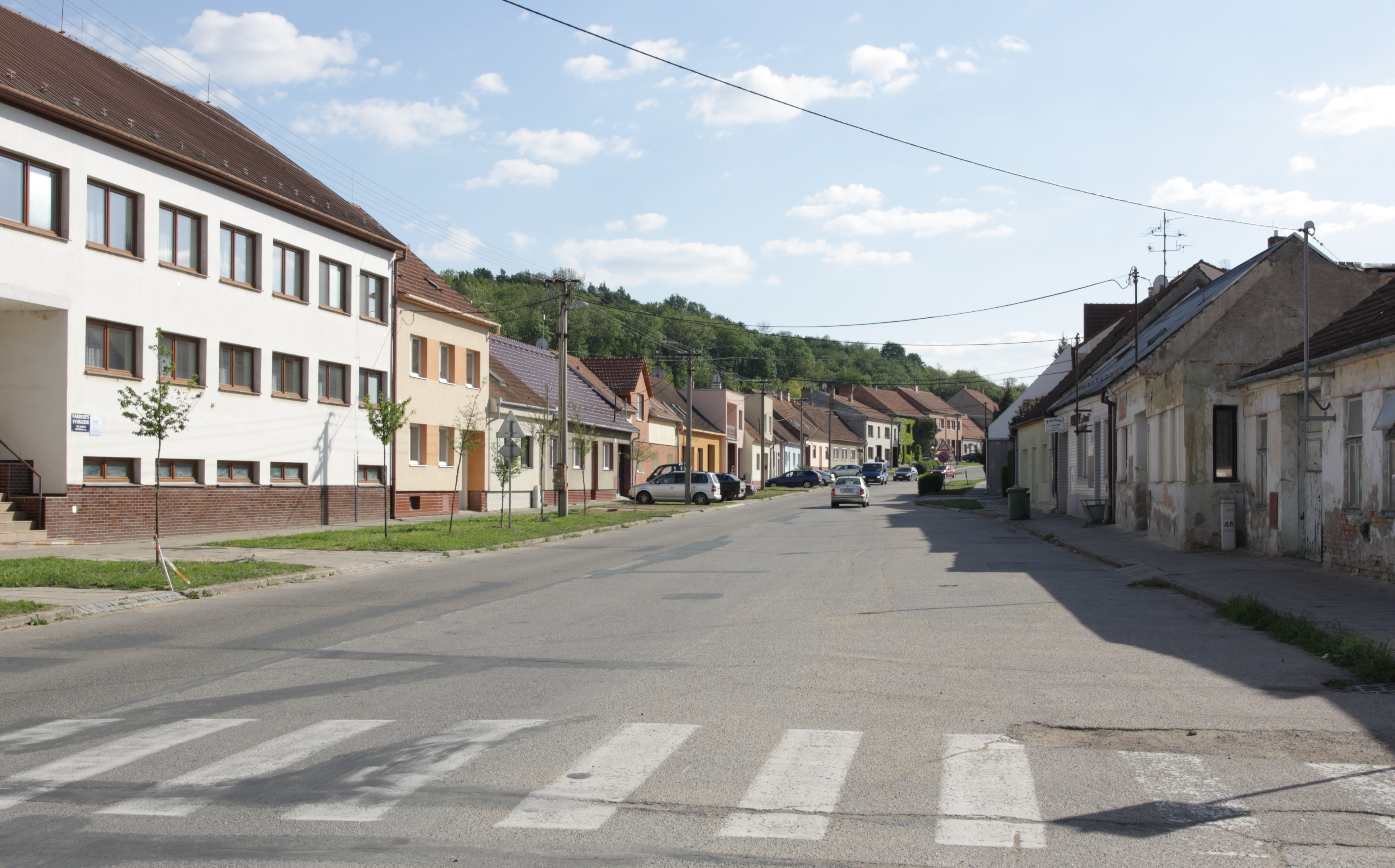 Hustopeče - ulice Nádražní.